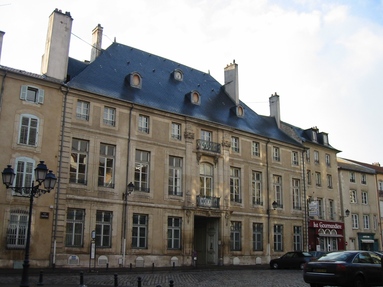 Façade de L'Hôtel de Ludres (ou de Custines) à Nancy. architecte Germain Boffrand